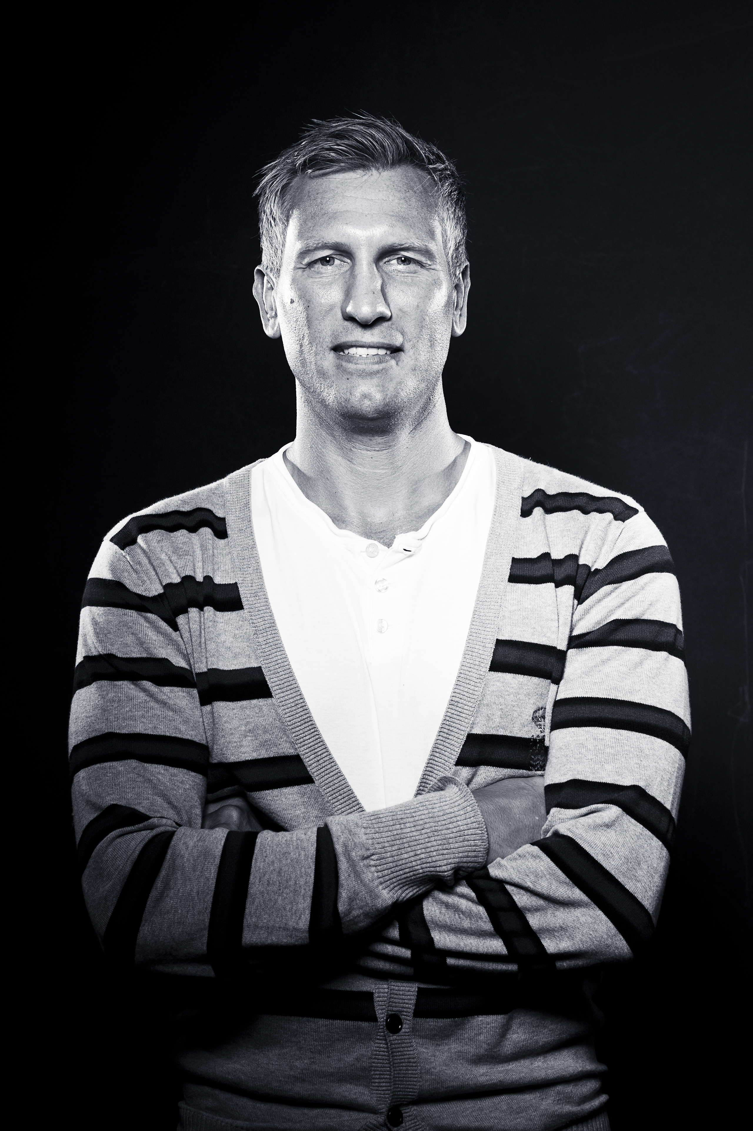 Dirk Klingenberg